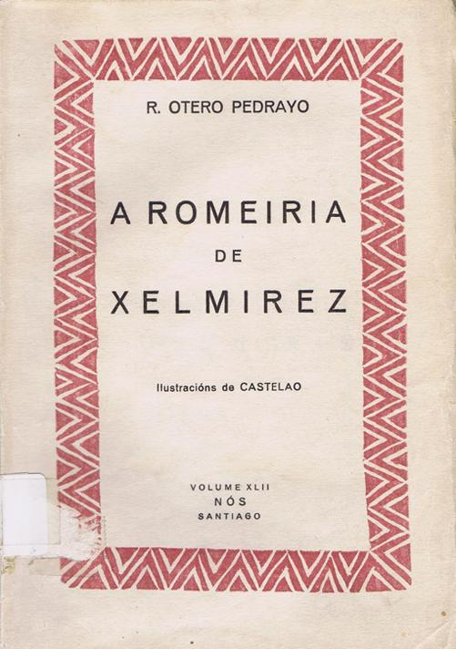 A romeiría de Xelmírez